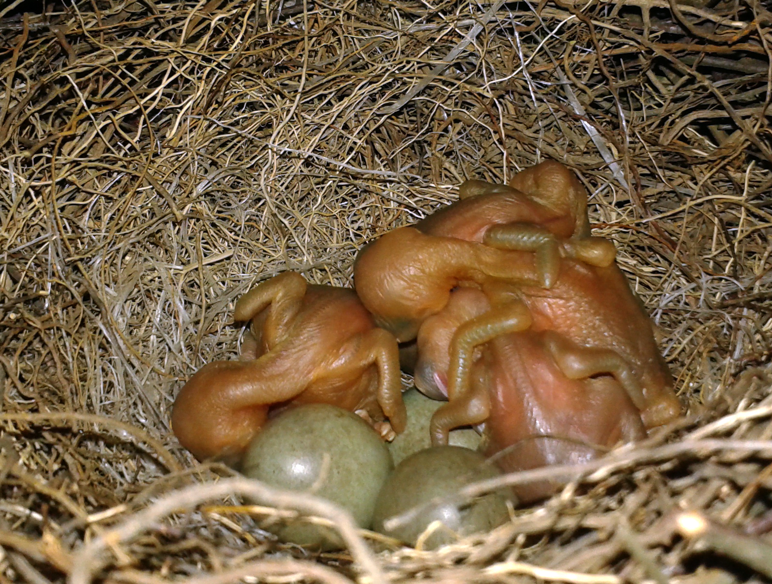 Pisklaki Sójki w gnieździe: ok 24 h od momentu wyklucia się